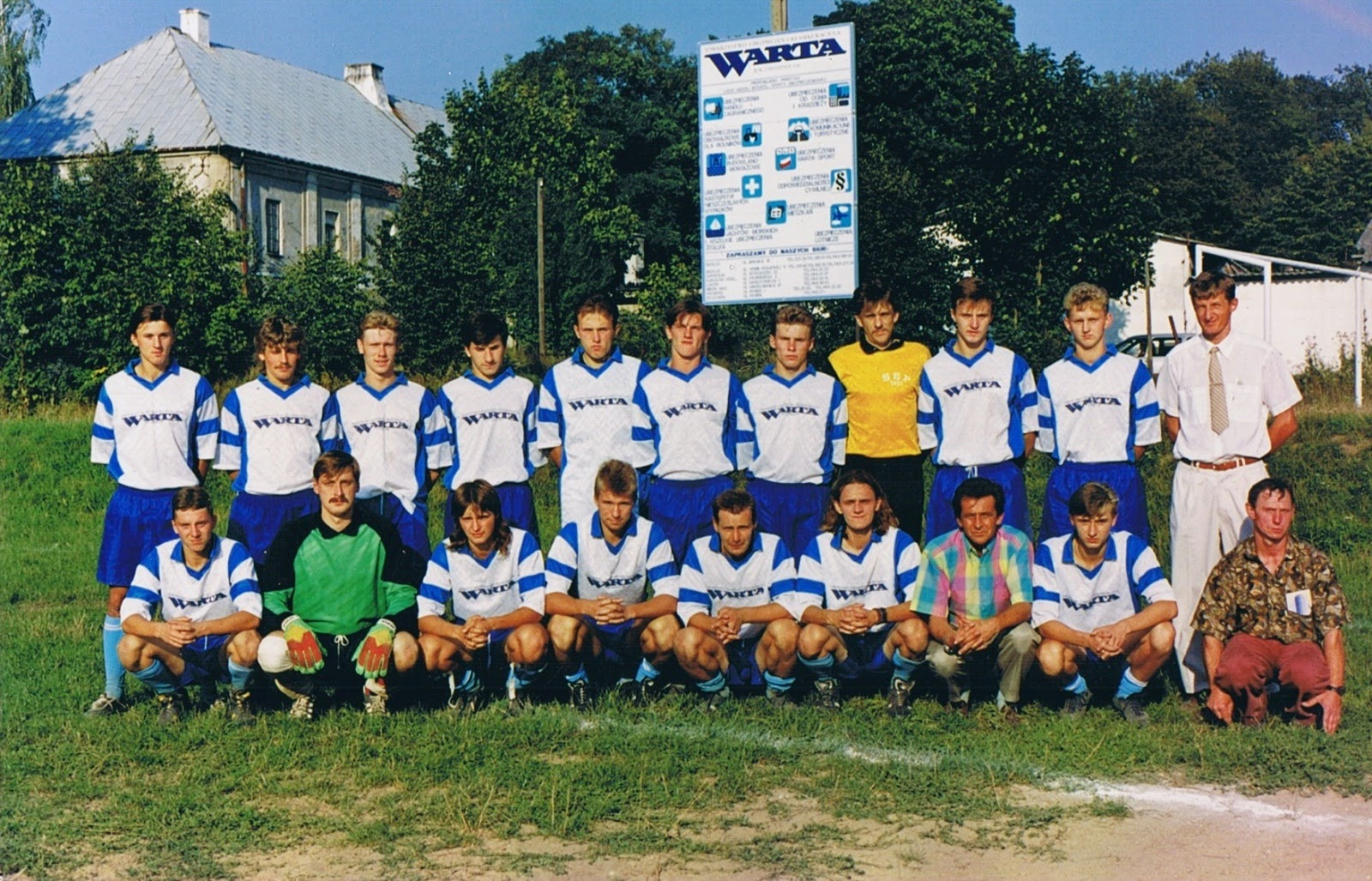 Piłkarze Sępa Żelechów lata 90